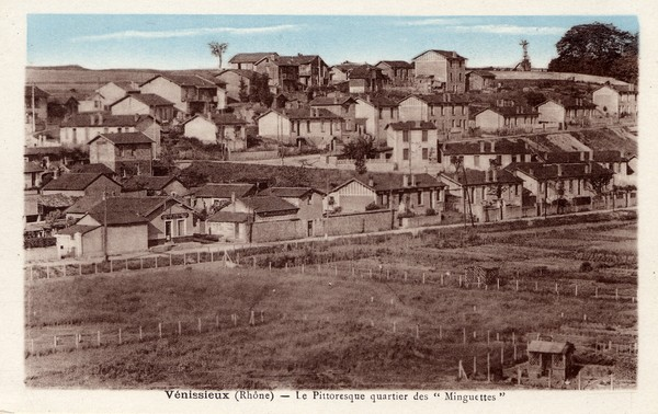 Le "pittoresque quartier des Minguettes", carte postale du début du XXème siècle.